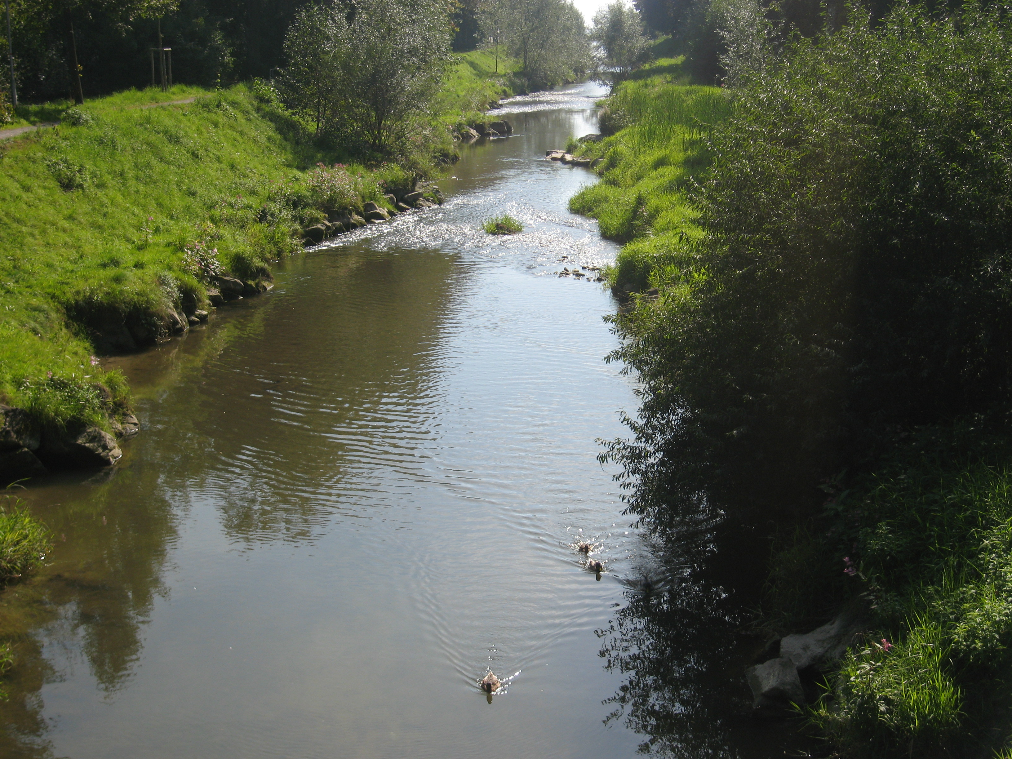 Die Rotach in Friedrichshafen